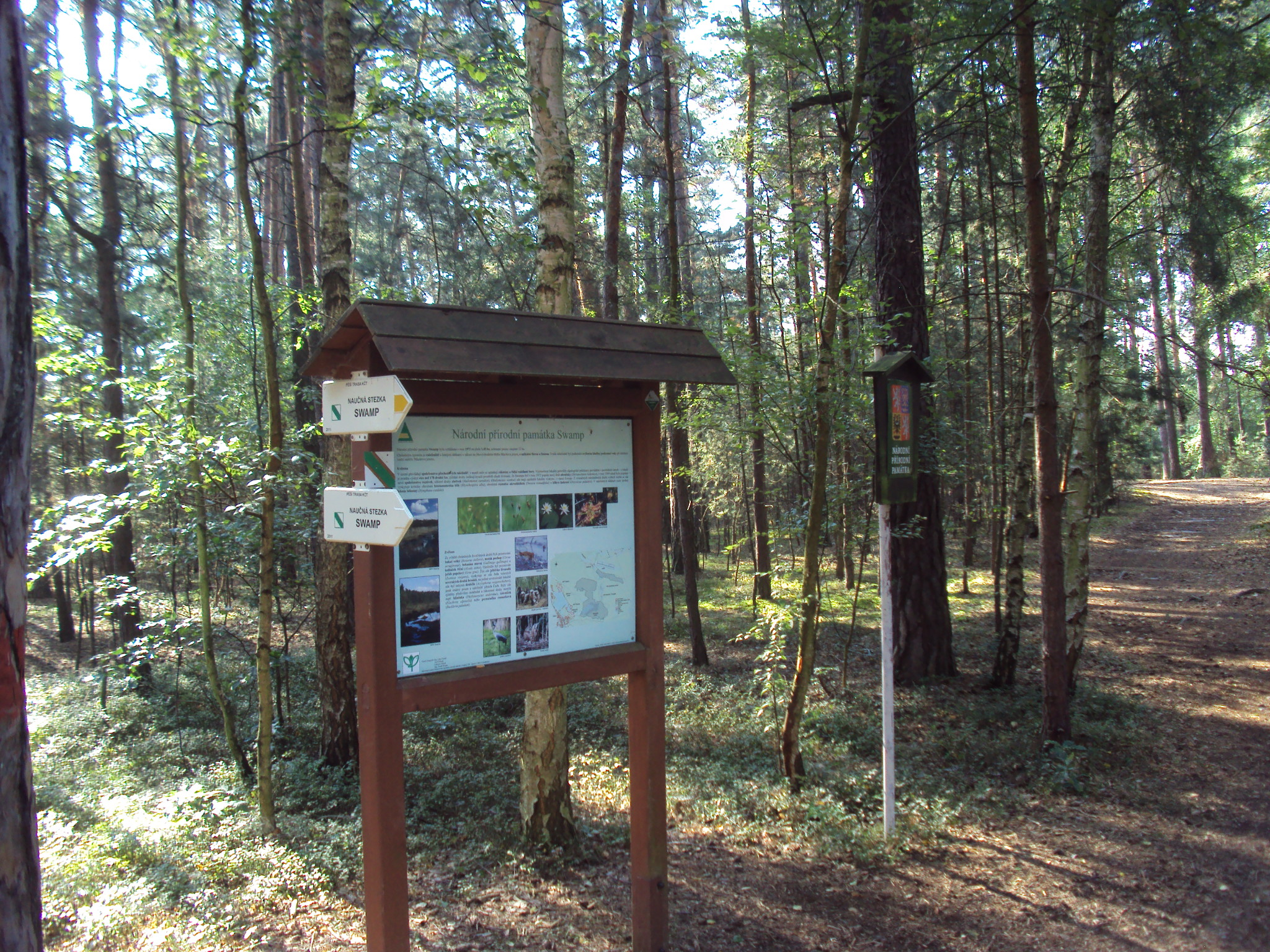 Tablo na SV Máchova jezera, patří k naučné stezce SWAMP